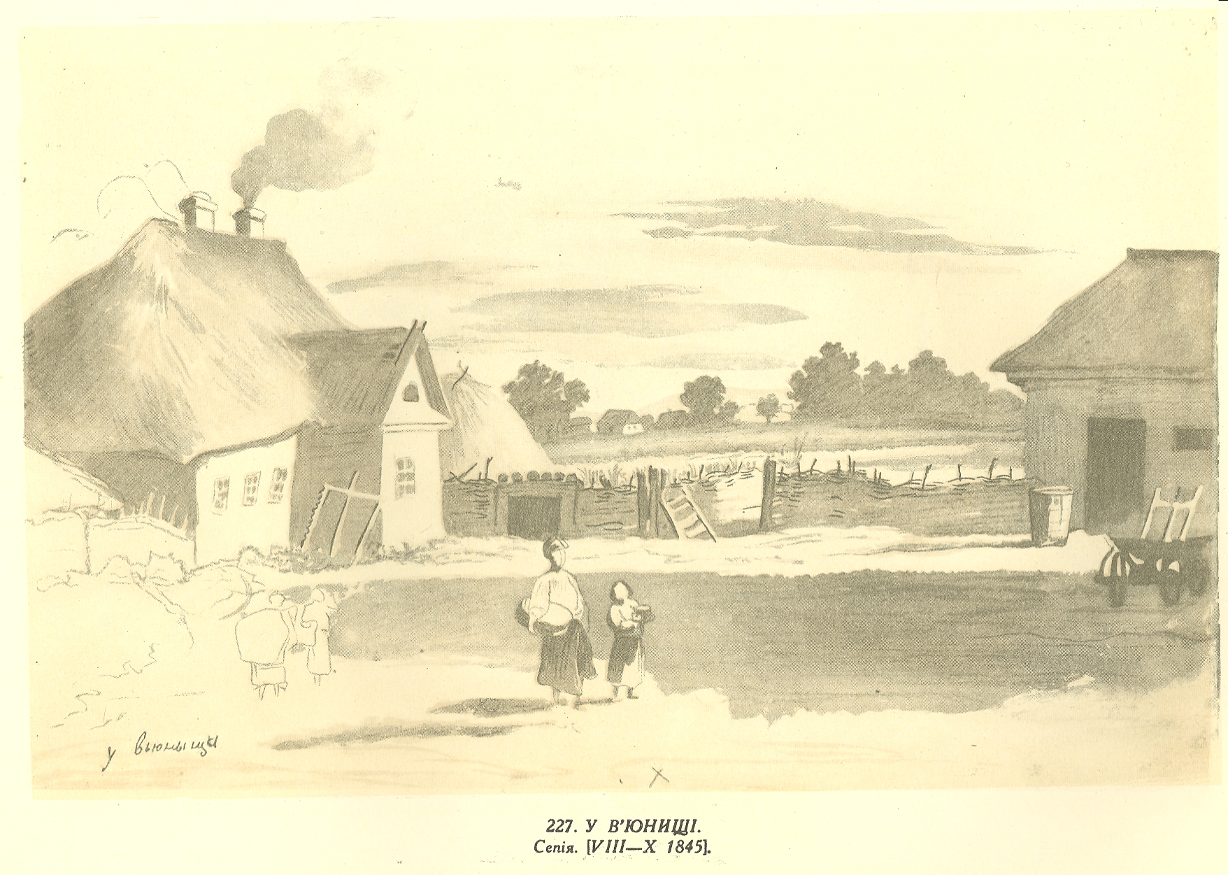 Тарас Шевченко. Повне зібрання творів в десяти томах. — К., 1961. — Т. 7: Живопис, графіка 1830-1847. — Кн. 1-2.